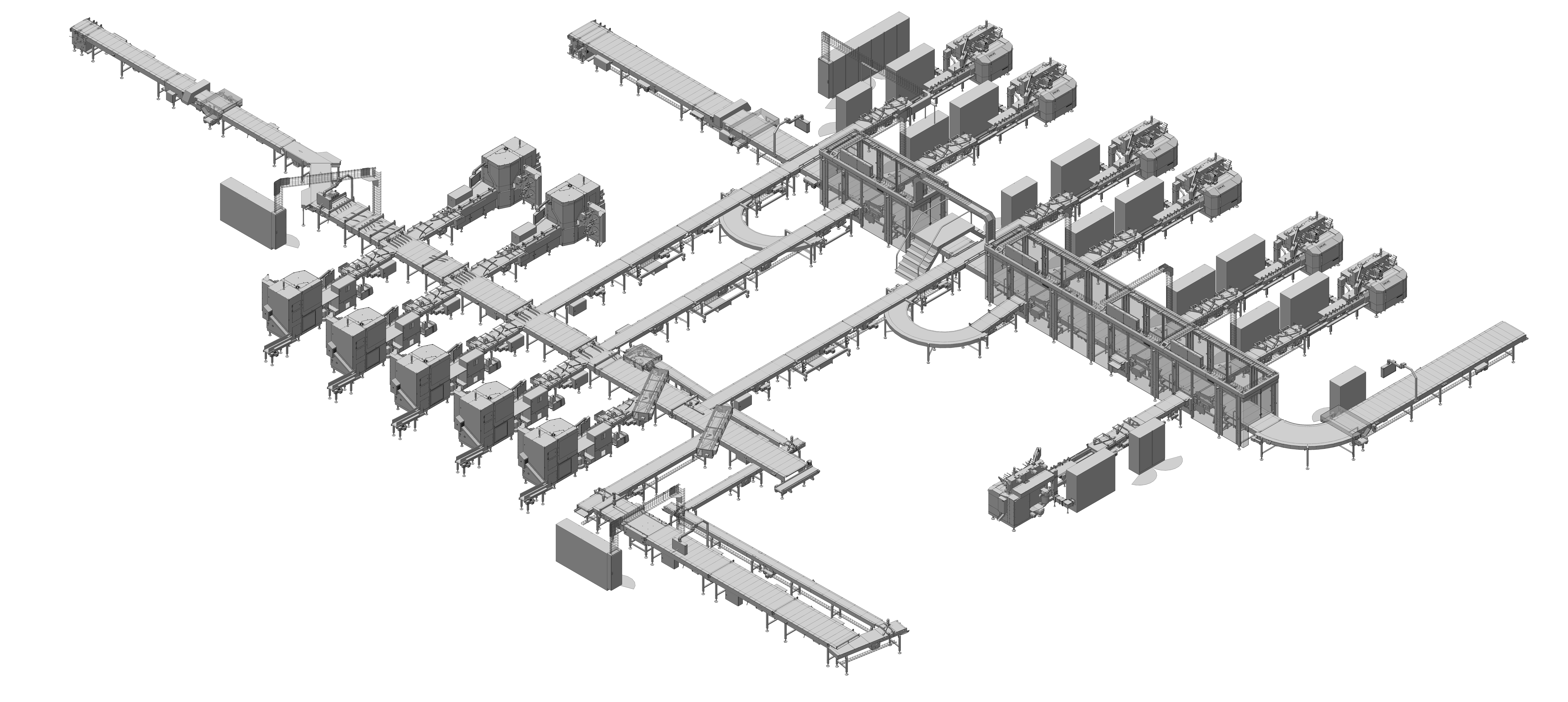 Vollautomatisches Verpackungssystem